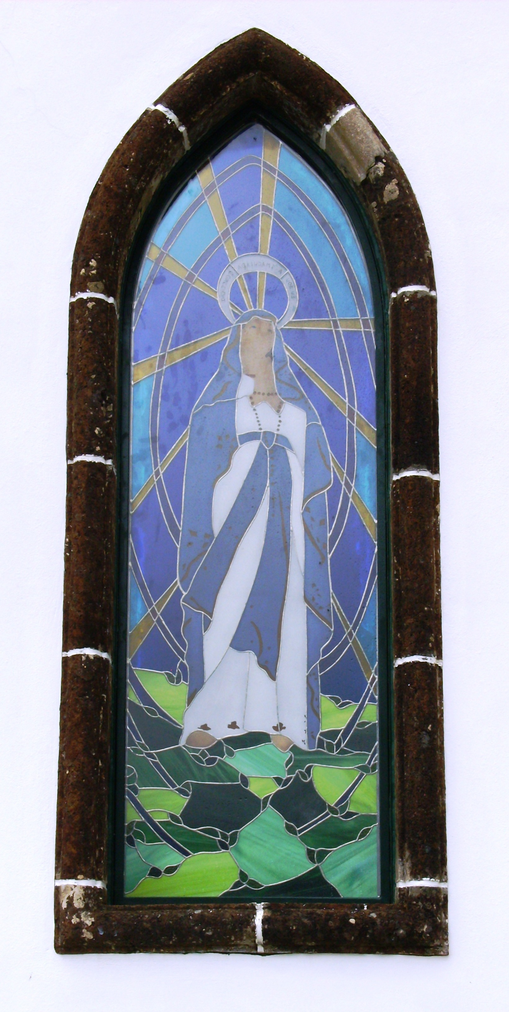 Ermida de Nossa Senhora de Lurdes, Ilha de Santa Maria (Açores), Portugal: vitral na lateral direita.